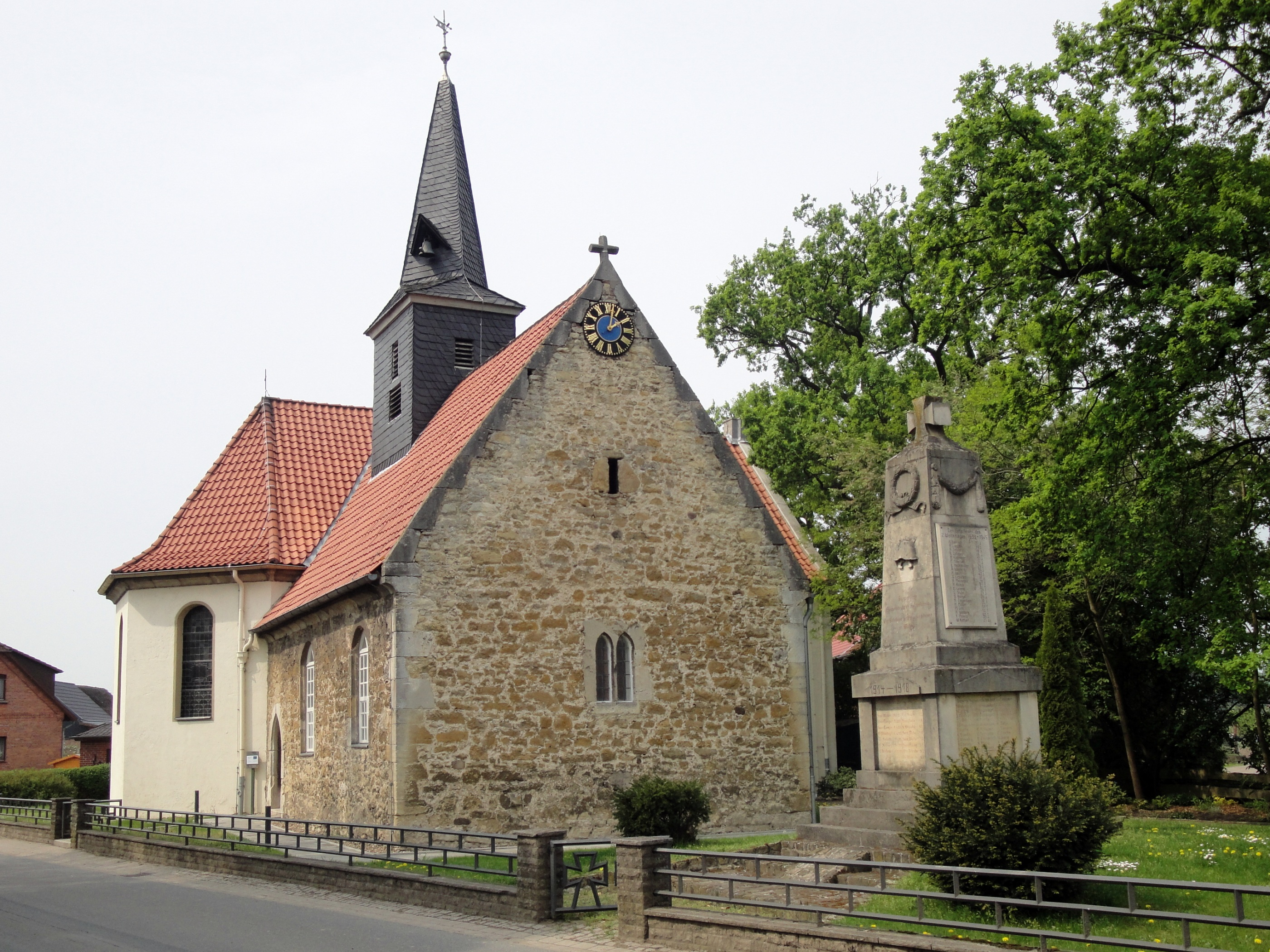 Evangelisch-lutherische Kirche und Kriegerdenkmal in Rötgesbüttel